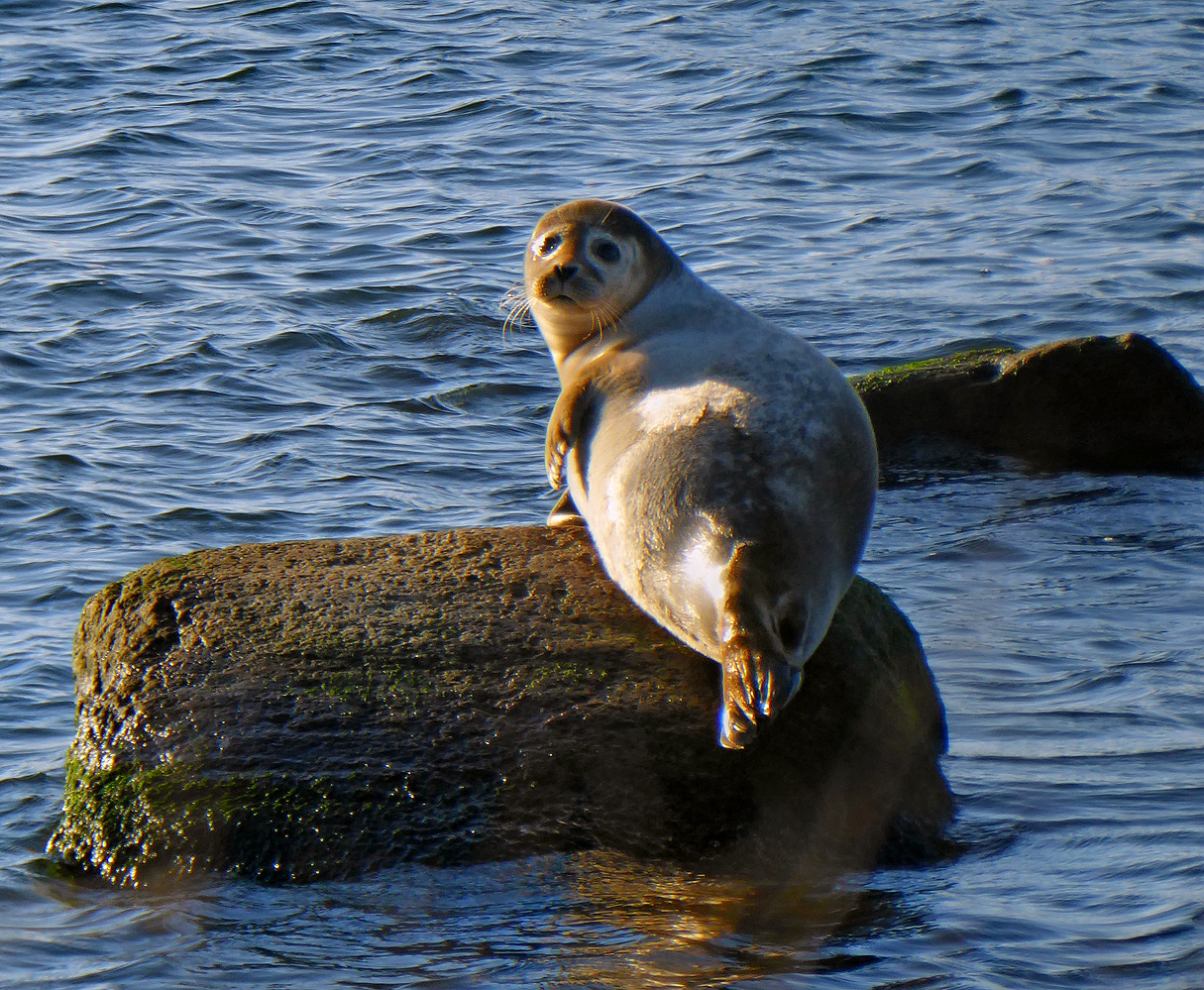 En ung Knubbsäl vilar på en sten vid Världens ände i Ystad 16 nov 2018.